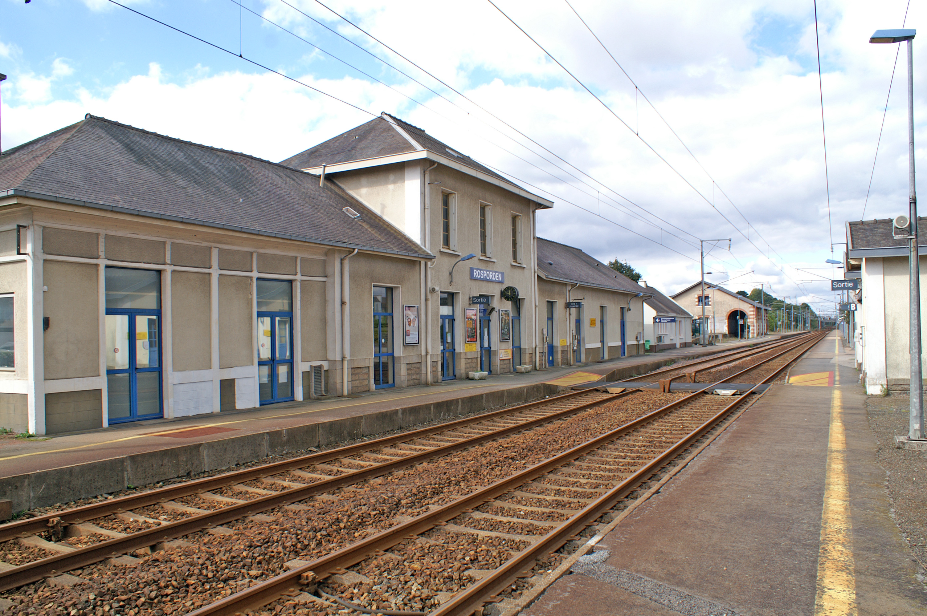 Intérieur gare voyageurs direction Quimper.